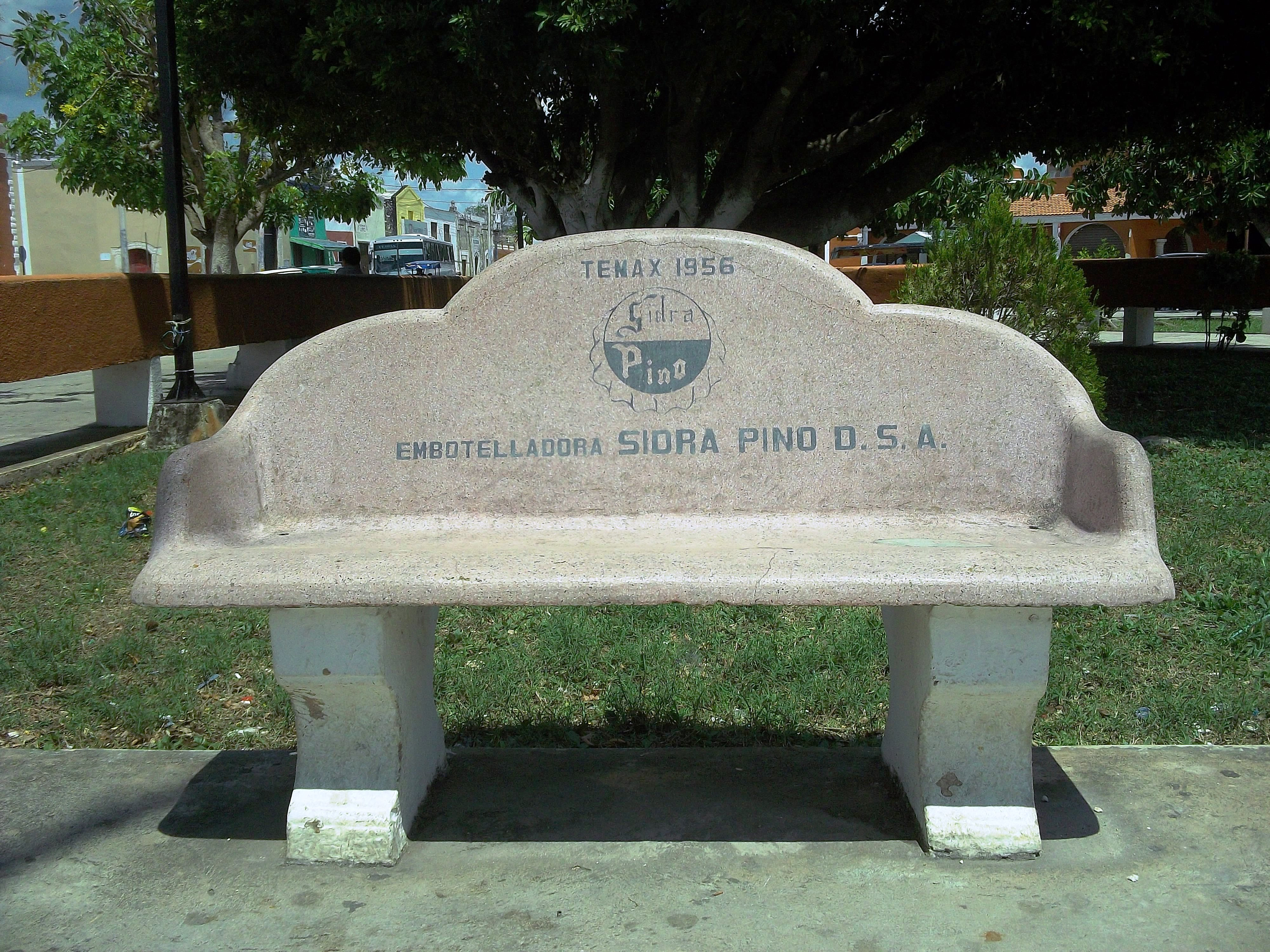 Banca del parque principal de Temax. Yucatán